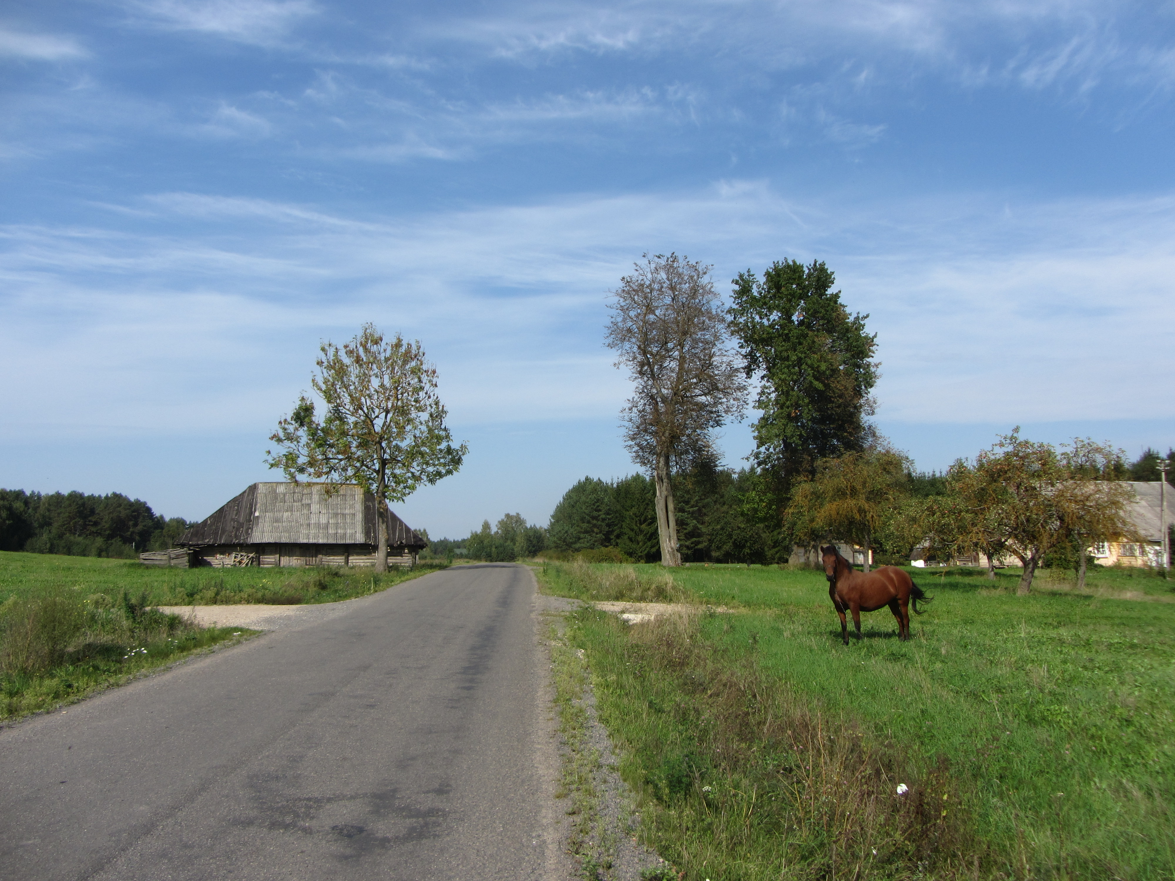 Inturkės sen., Lithuania